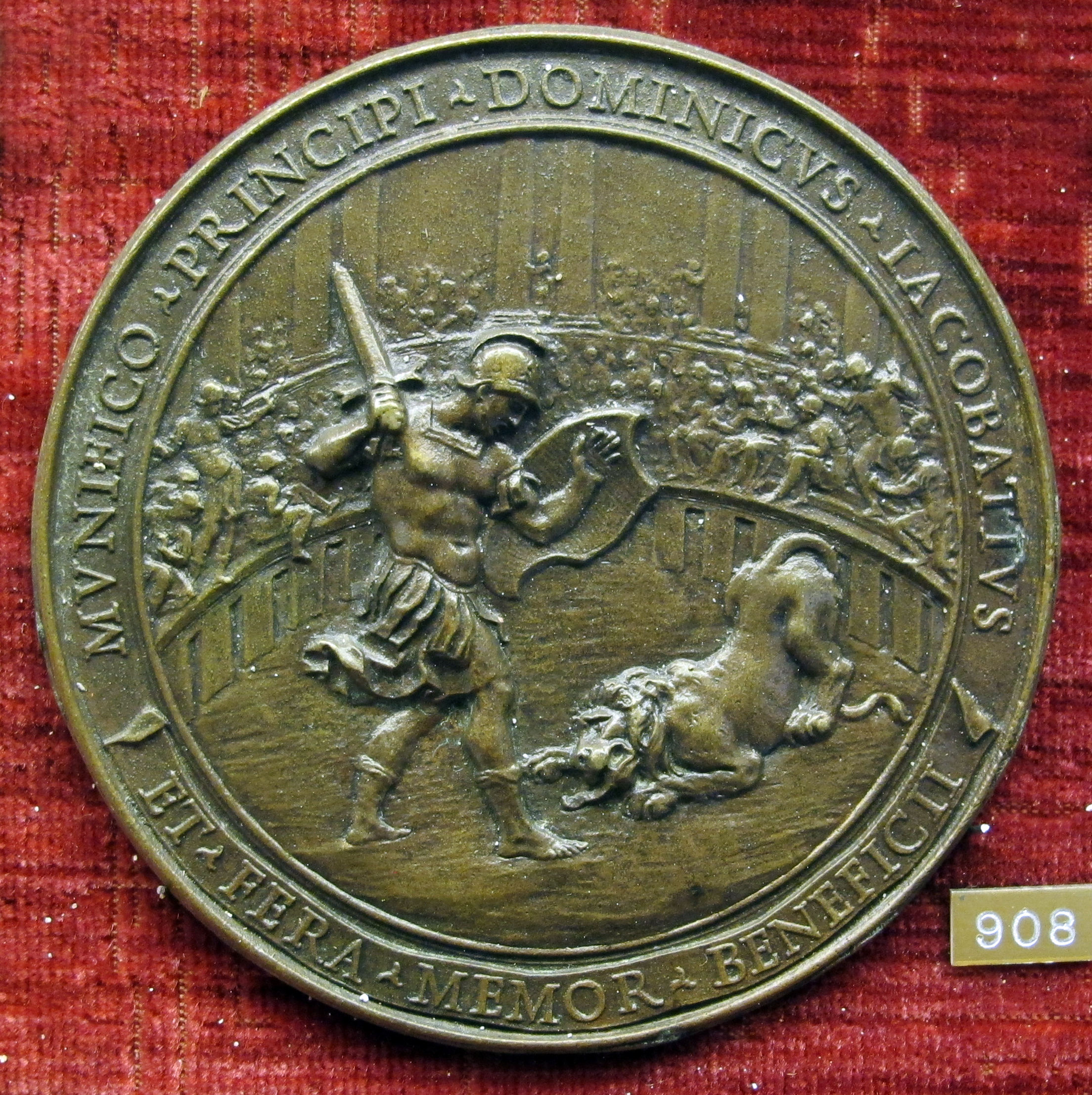 Medaglie romane '600-'700 , a bronze medal by Gioacchino Francesco Travani after designs by Gian Lorenzo Bernini, dated 1659.